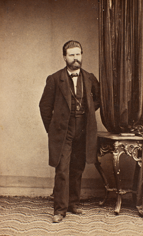 Bjørnstjerne Bjørnson, 1862.